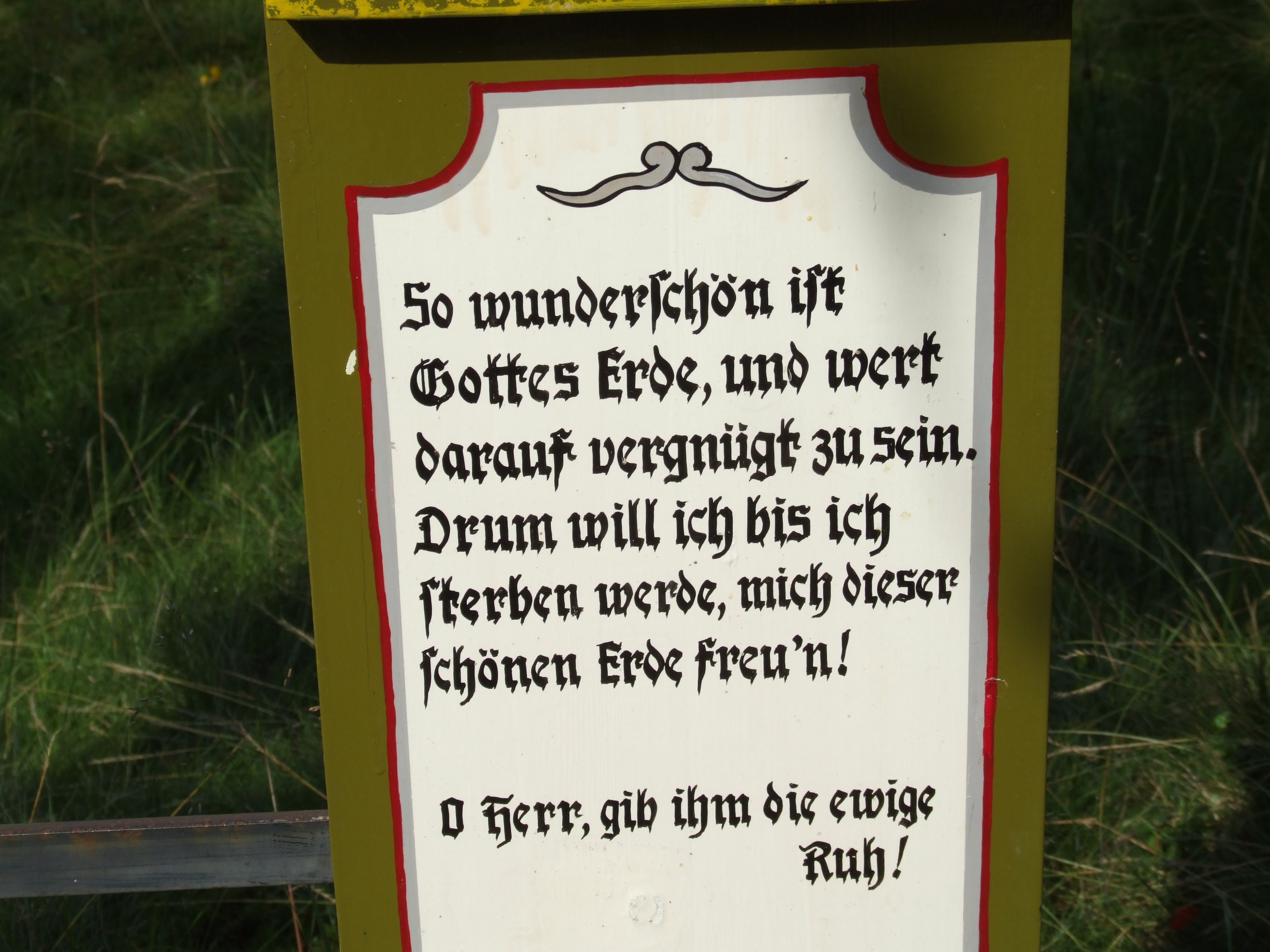 Sinnspruch auf einem Totenbrett bei Brennes, Gebiet Großer Arber, Bayrischer Wald